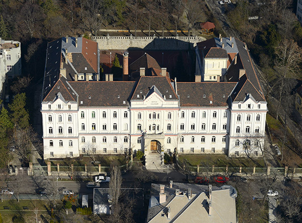 Eötvös Kollégium